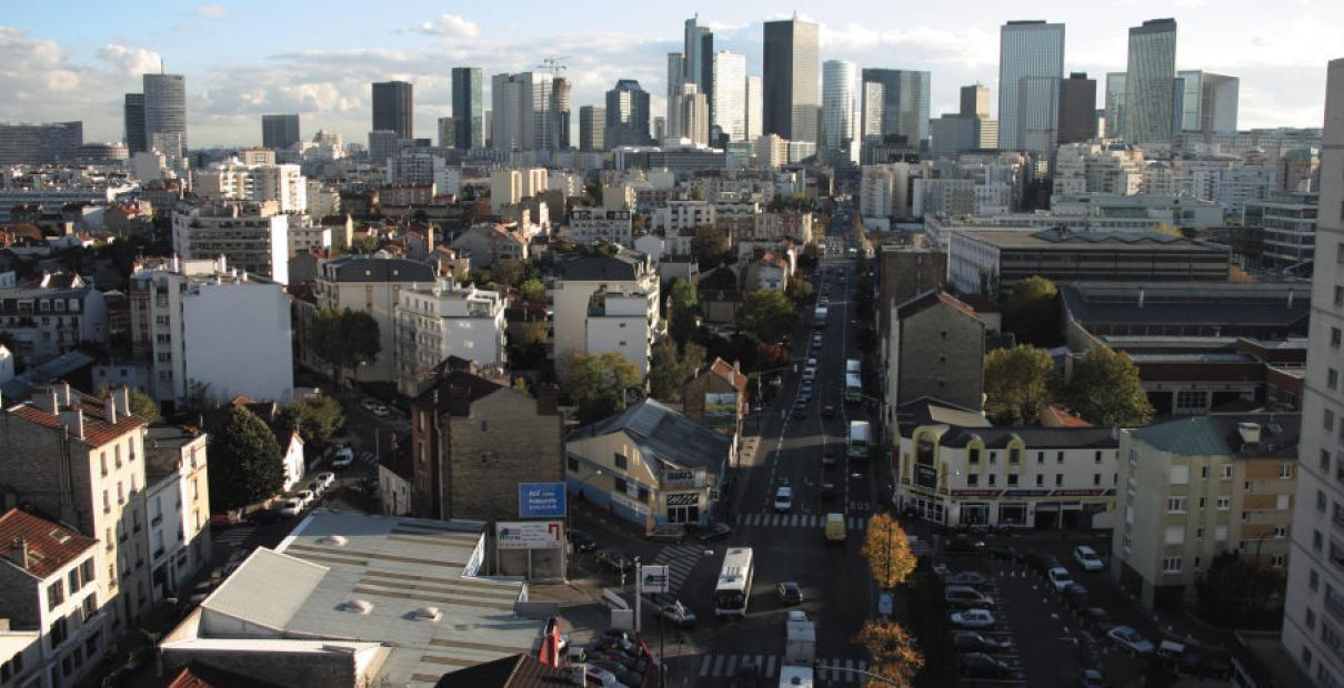 La Garenne-Colombes, quart sud ouest